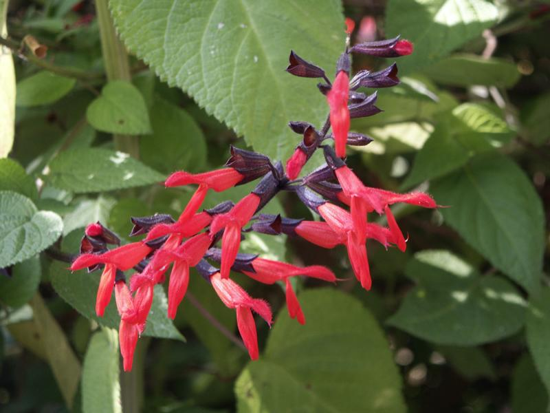 Lakeside Park, Oakland, CA